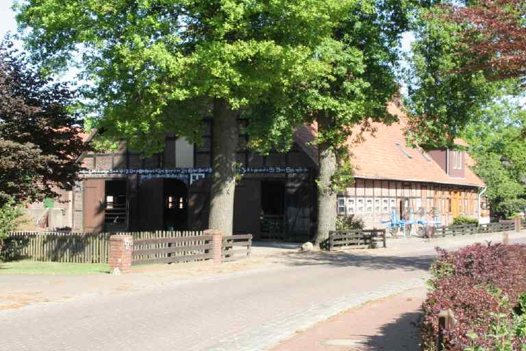 Hof Otte in Eversen